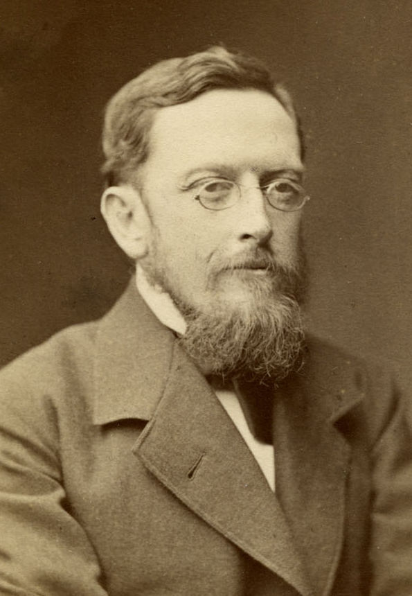 Foto di Jacob Lueroth